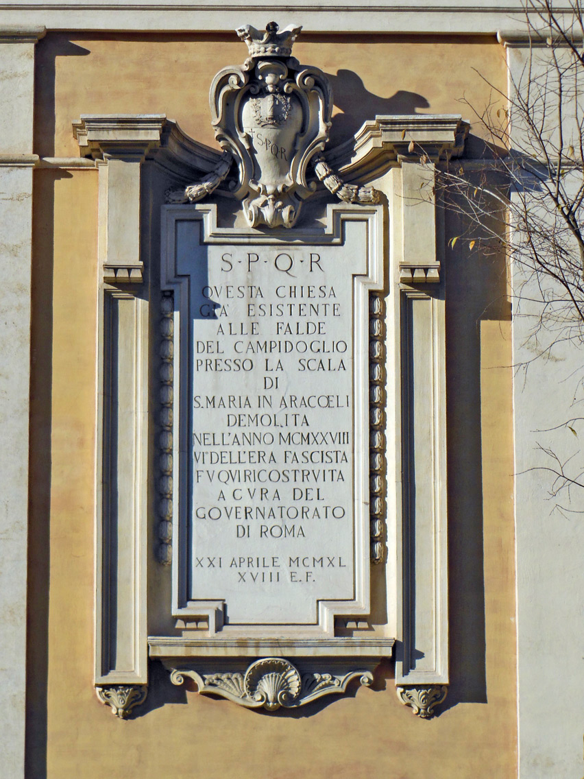 Roma, chiesa di Santa Rita da Cascia in Campitelli, fianco, particolare dell'iscrizione che ricorda lo spostamento